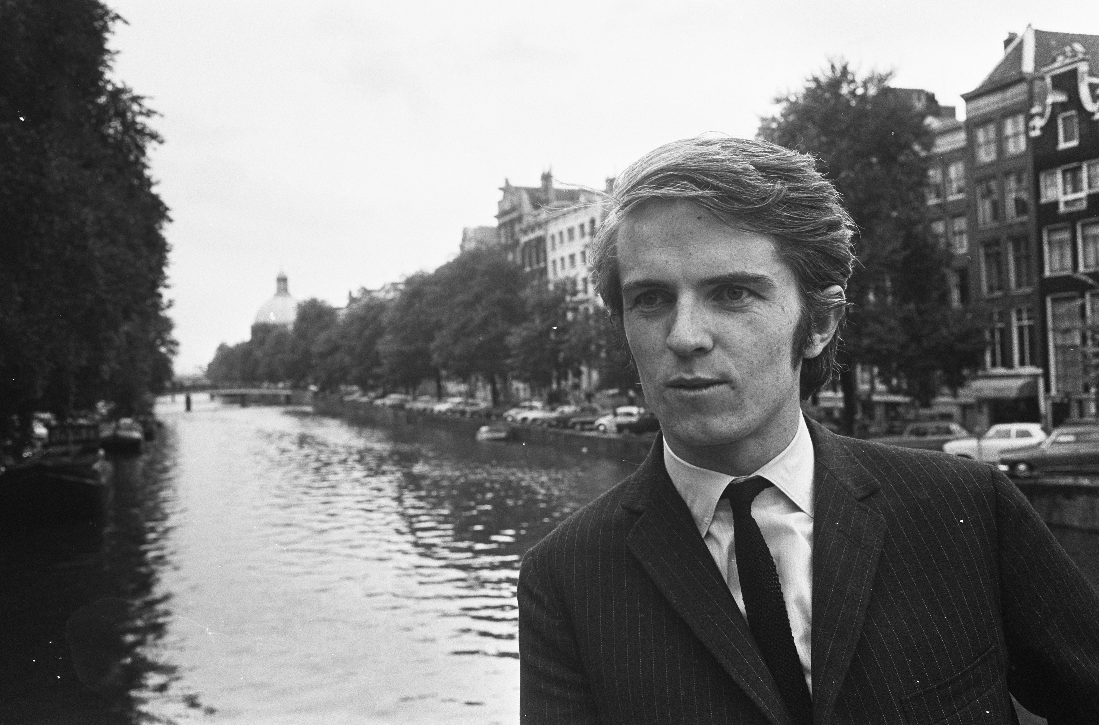 Collectie / Archief : Fotocollectie Anefo Reportage / Serie : [ onbekend ] Beschrijving : Radio Caroline in Amsterdam. De Ier Ronan O'Rahilly eigenaar van Caroline Datum : 16 augustus 1967 Locatie : Amsterdam, Noord-Holland Trefwoorden : eigenaars Persoonsnaam : O'Rahilly, Ronan Fotograaf : Koch, Eric / Anefo Auteursrechthebbende : Nationaal Archief Materiaalsoort : Negatief (zwart/wit) Nummer archiefinventaris : bekijk toegang 2.24.01.05 Bestanddeelnummer : 920-6056